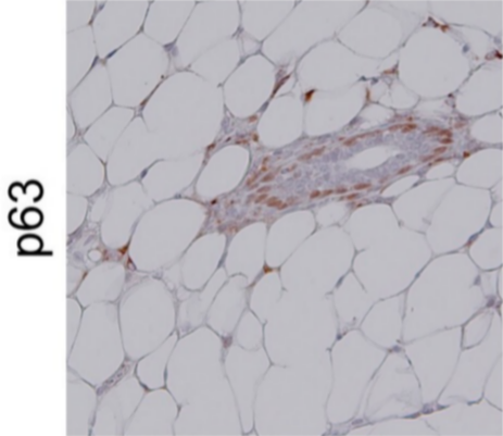 Fig.3. Identificación de marcadores mioepiteliales en tejido de glándula mamaria de ratón C57BL/6J MMTV-PyMT. Secciones de tejido de glándula mamaria. Marcador mioepitelial p63 se visualizó con DAB (tinción marrón). p63 es una proteína que se expresa intensamente en el núcleo de las células mioepiteliales basales de glándula mamaria. La barra de escala representa 50 μm.